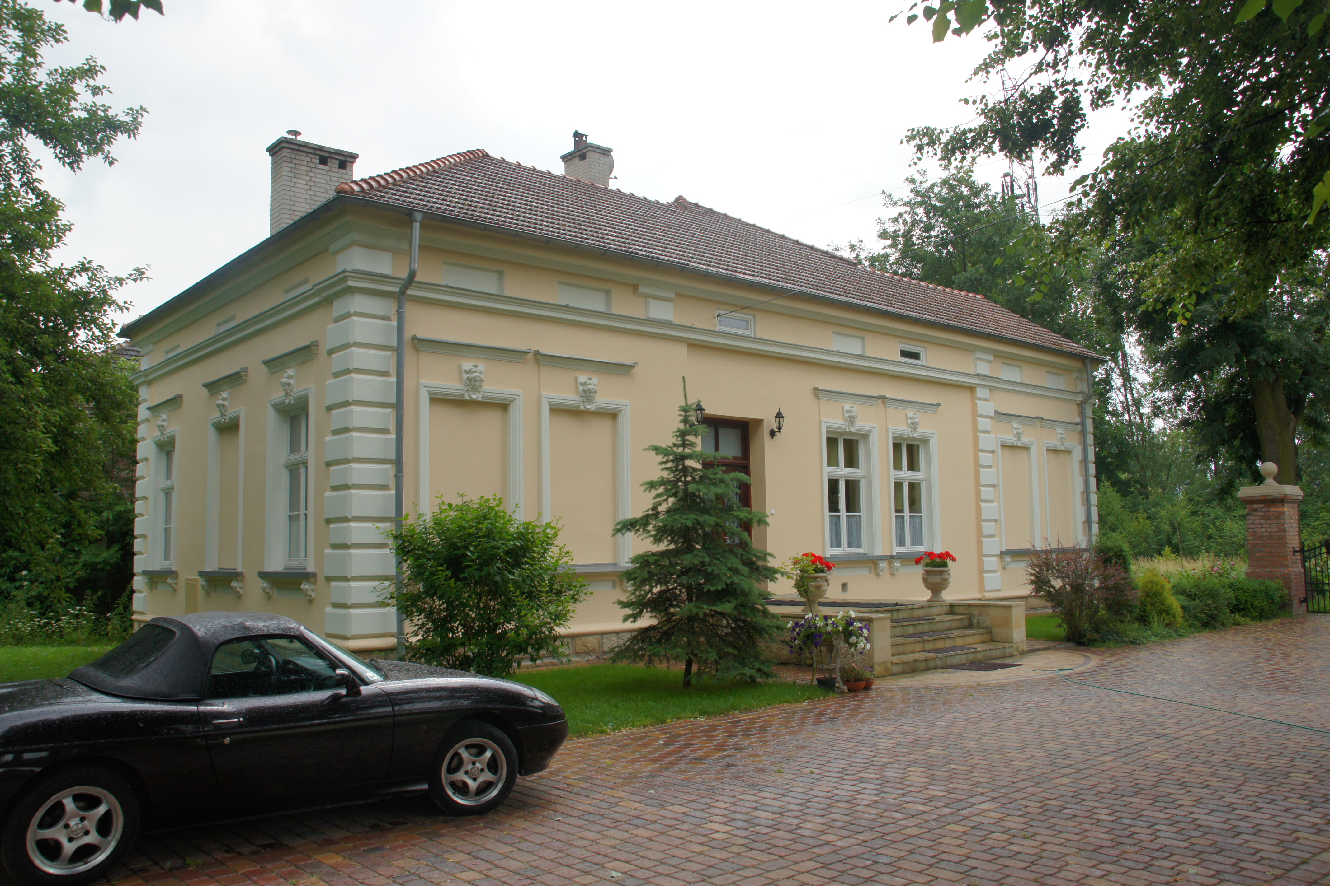 Dworek w Toniach